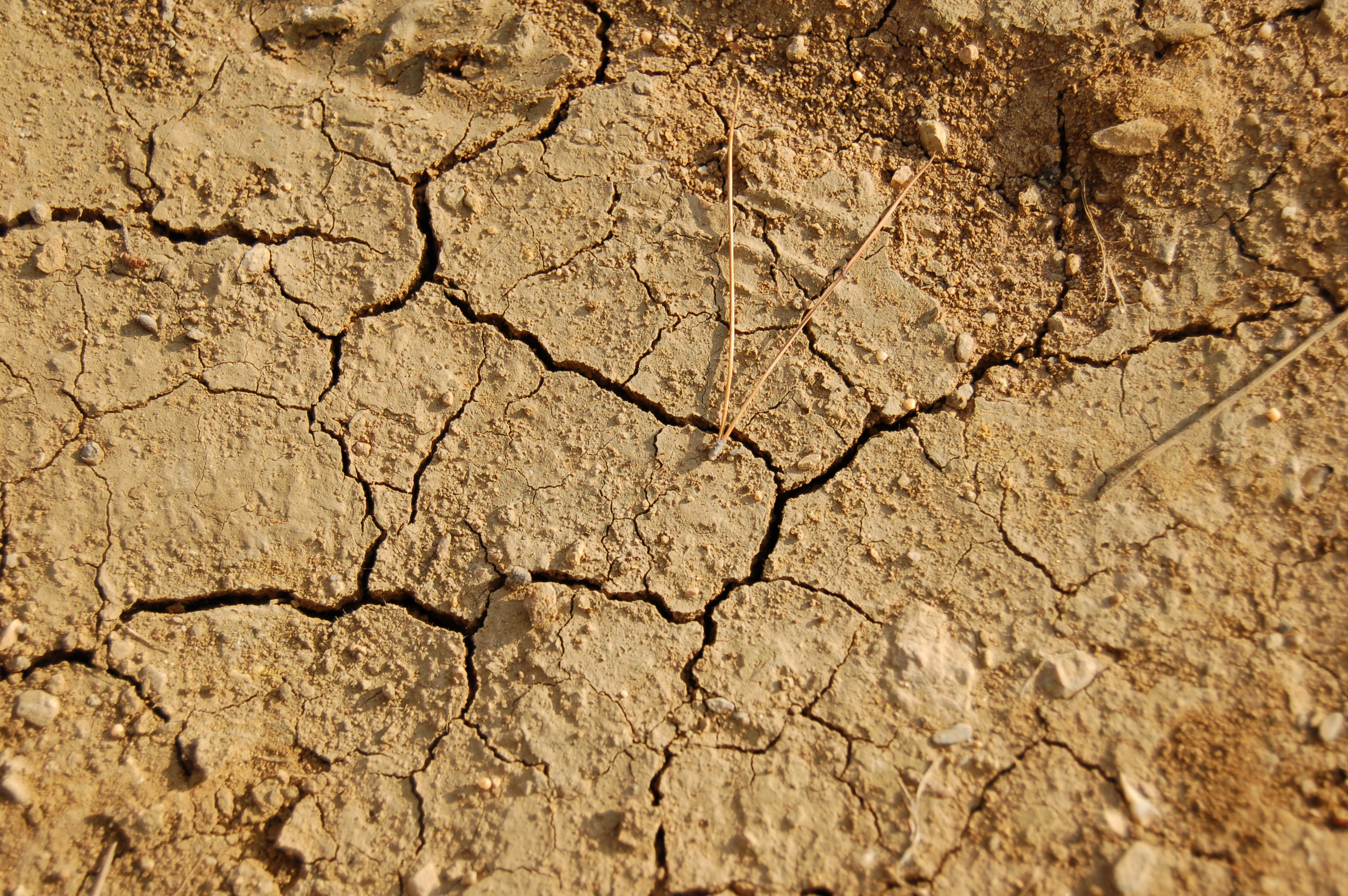 Terre asséchée Prise à Toulon Avril 2007